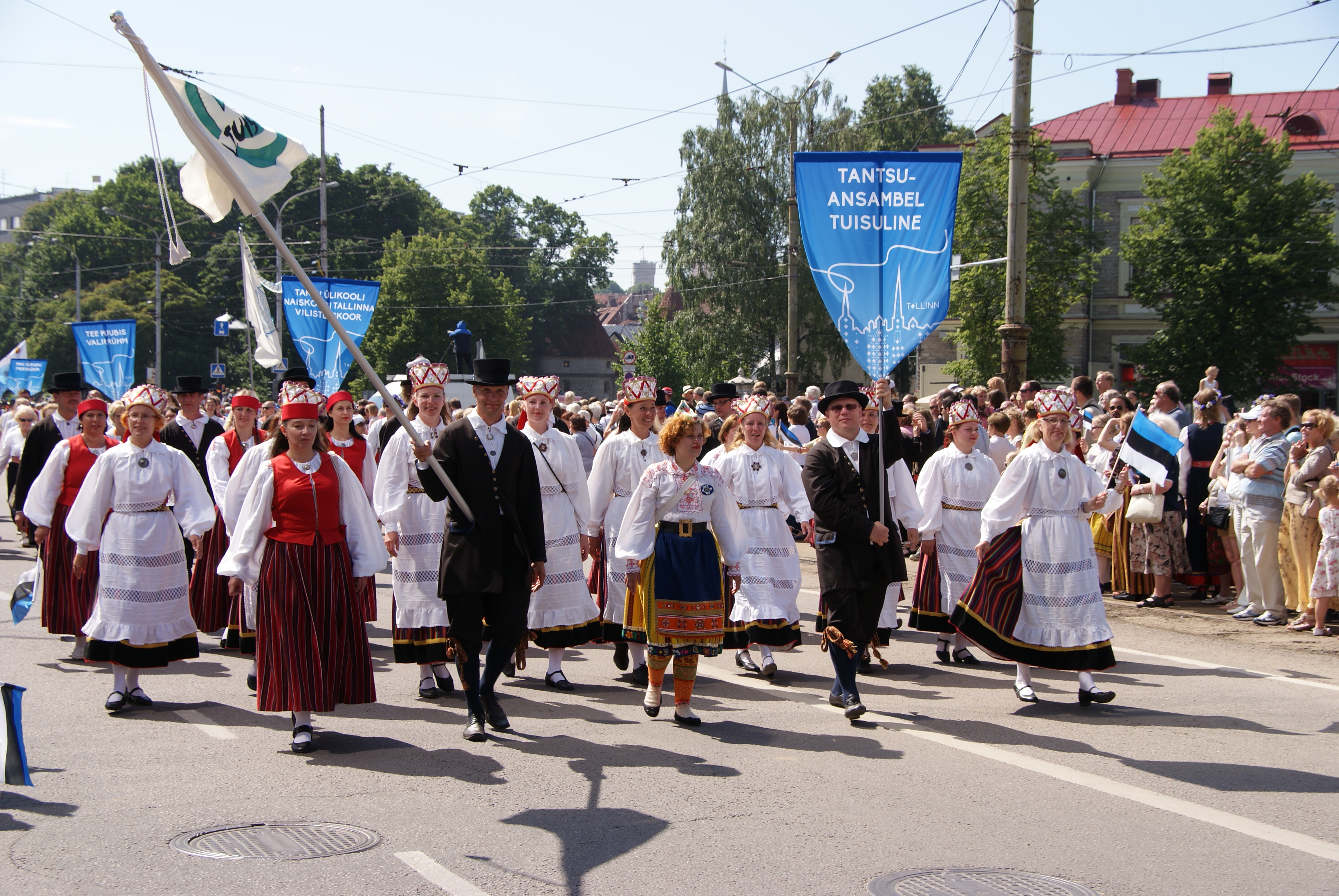 Tuisuline 2014. a laulu- ja tantsupeo rongkäigus.